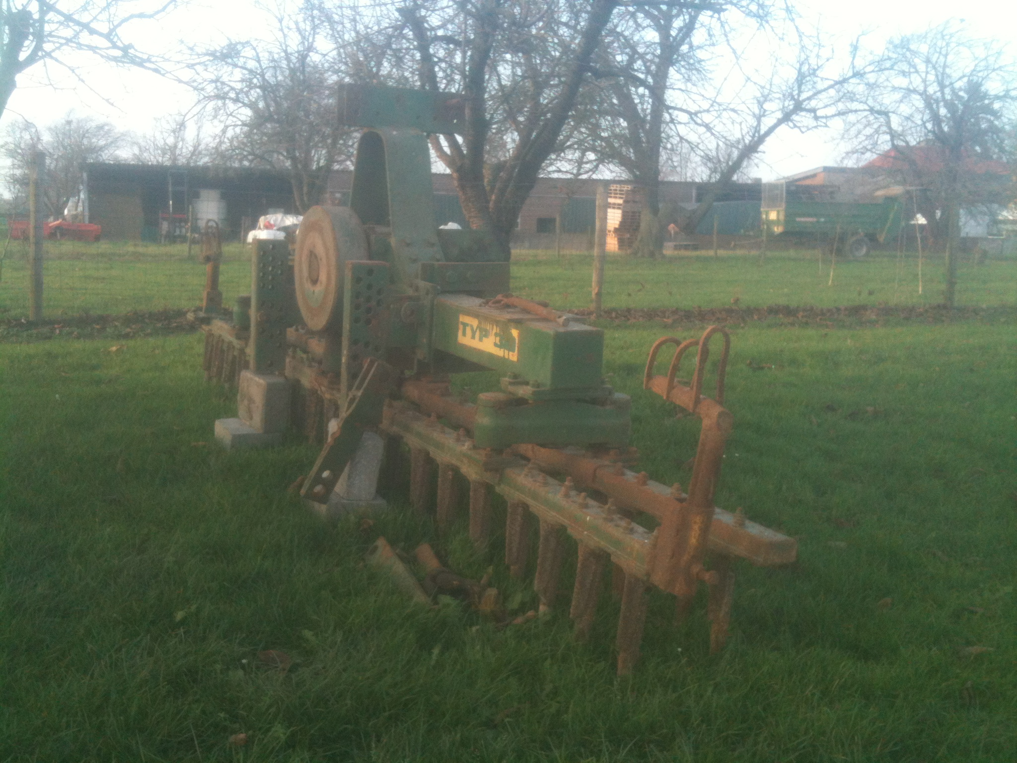 Amazone Rüttelegge